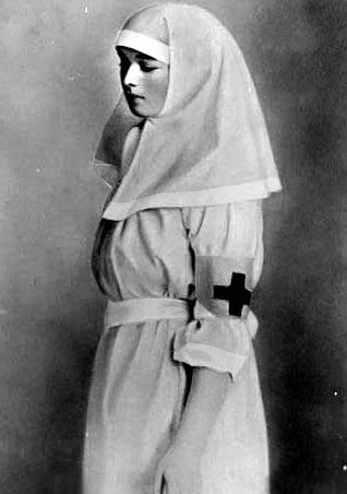 Olga Nikolaevna